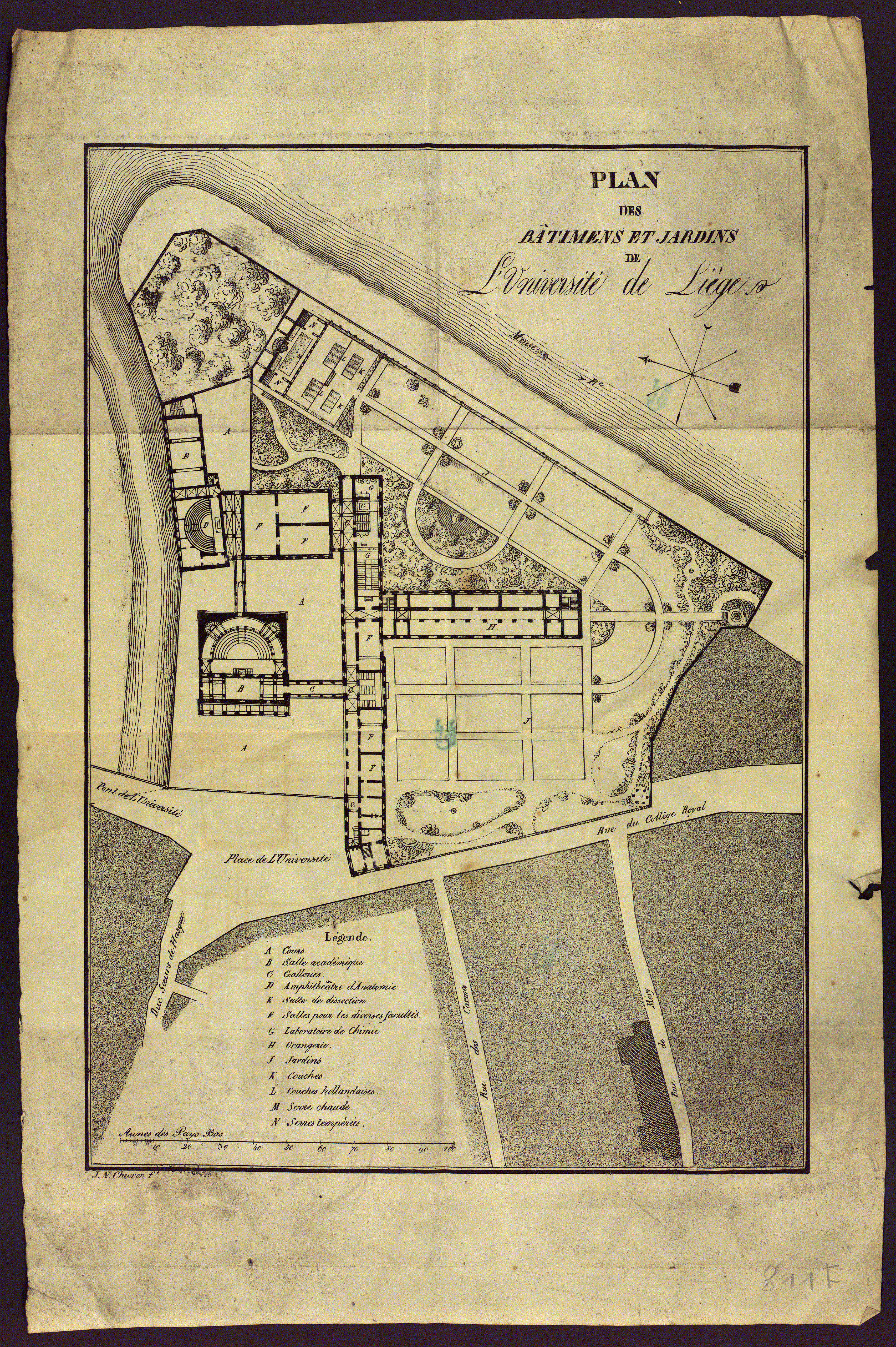 Plan des bâtiments et jardins de l’Université de Liège par Jean-Noël Chevron